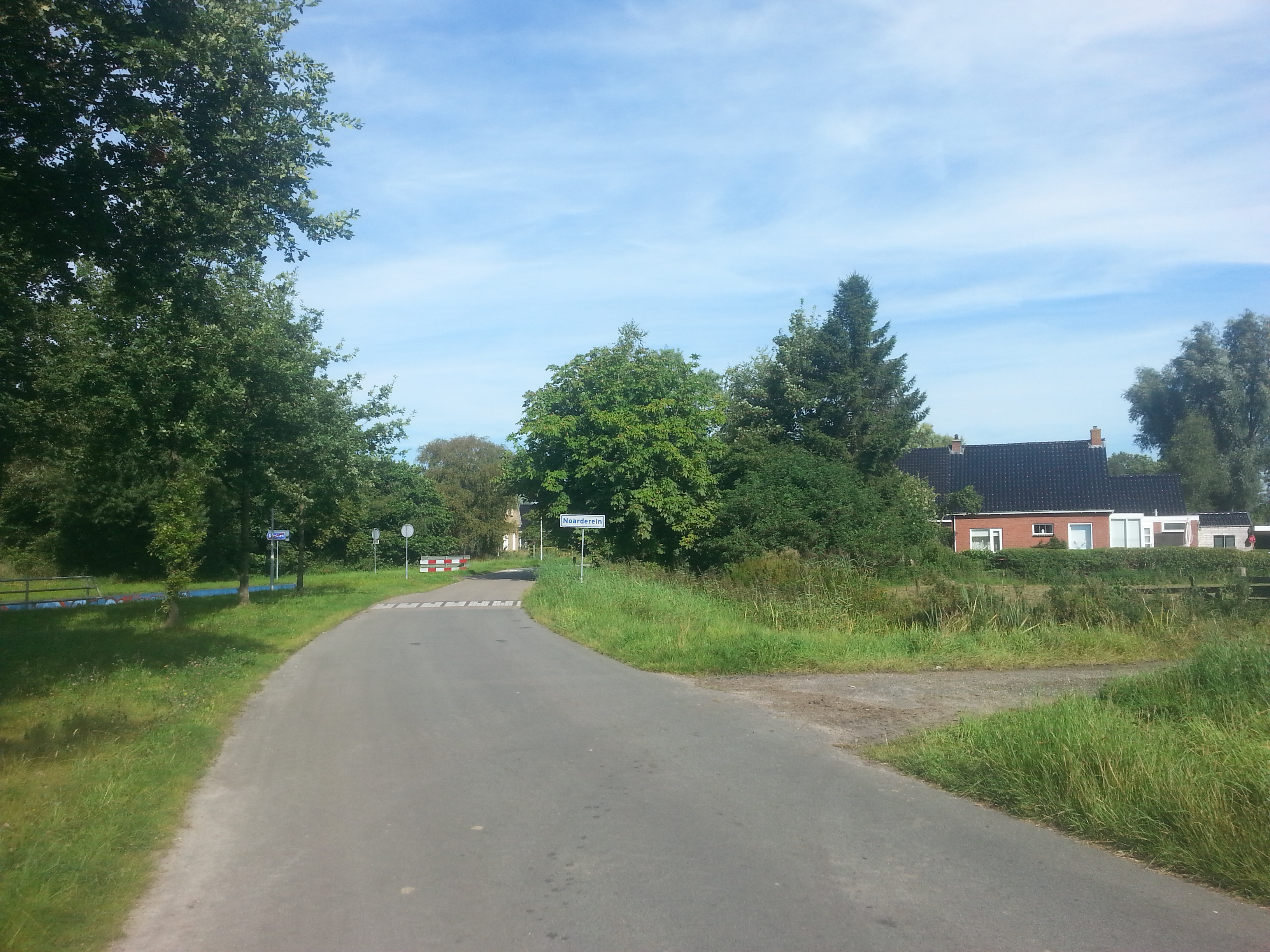 Het buurtschapje Noordereind in de gemeente Smallingerland, tijdens een fietstocht.